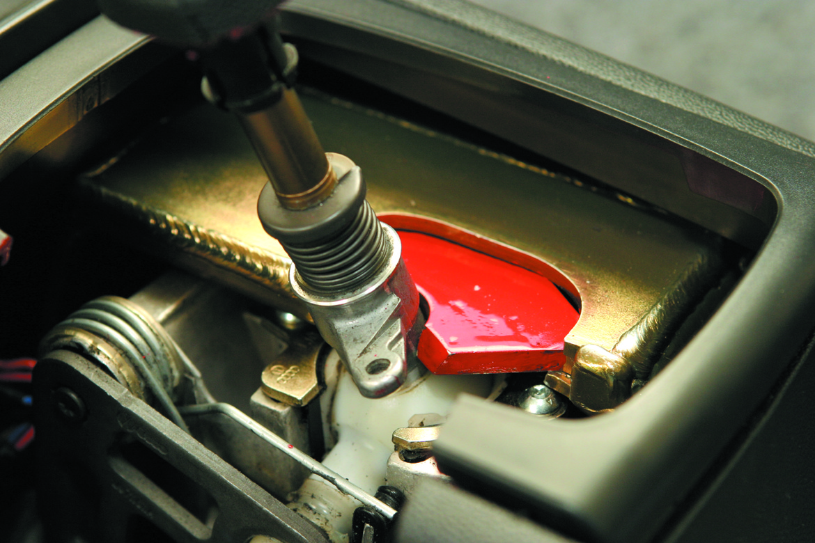 Safetronic od CONSTRUCT CZECH a.s.